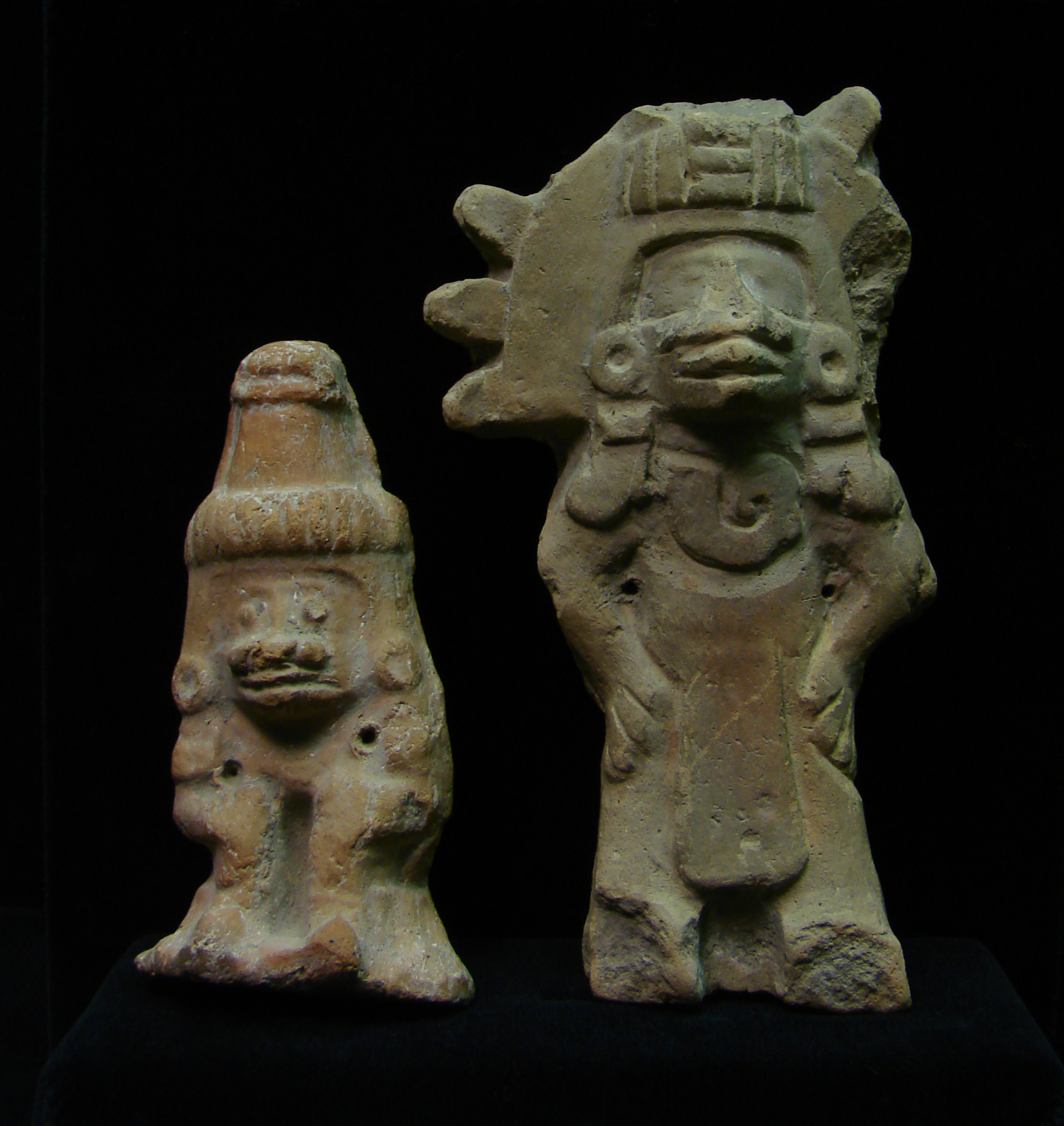 Statuettes de culture aztèque, musée d'Auch.